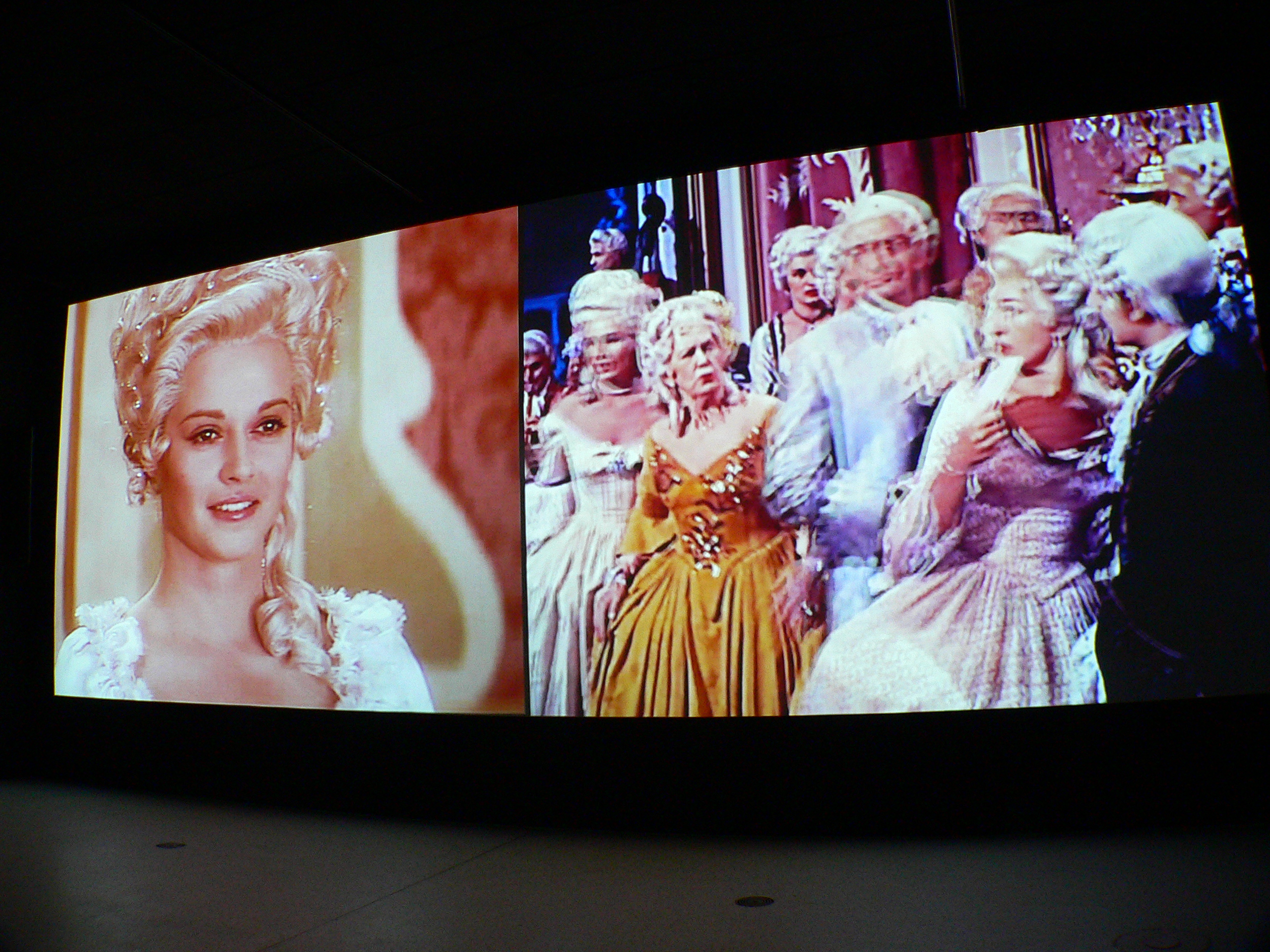 Multivision im Museum GrimmWelt in Kassel, Deutschland